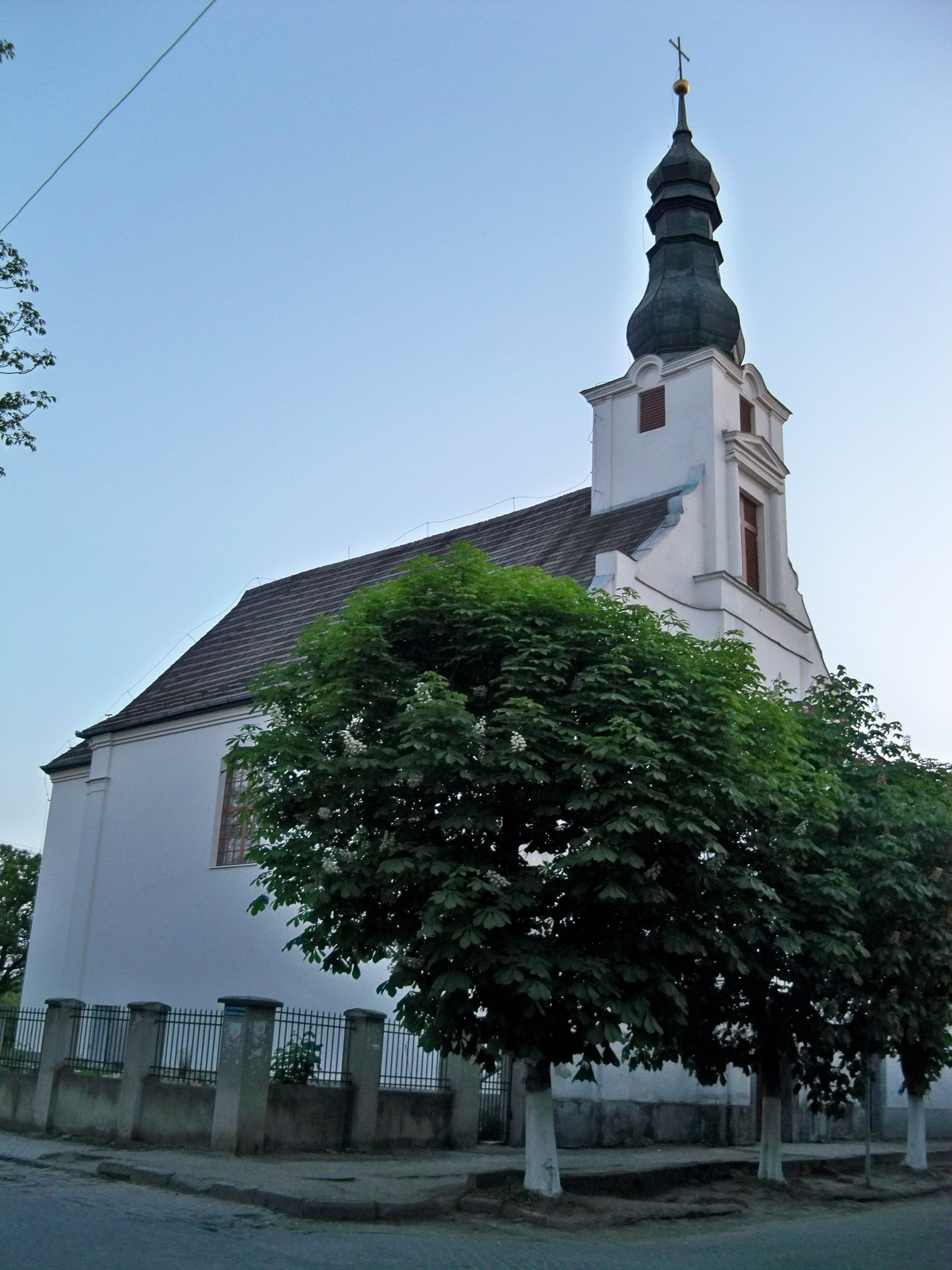 Францисканський монастир (мур.) :, Виноградів, вул.Миру, 3